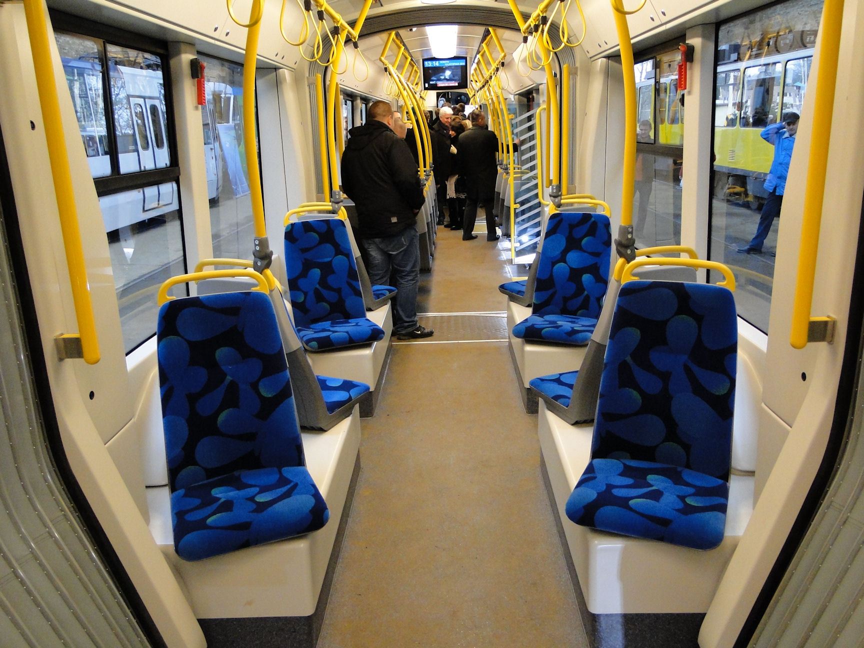 Tramwaj PESA 120Na SWING (wersja dla Szczecina)